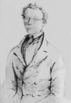 De plattdüütsche Schriever Fooke Hoissen Müller 1843 mit Bleestift tekent vun Neupert.